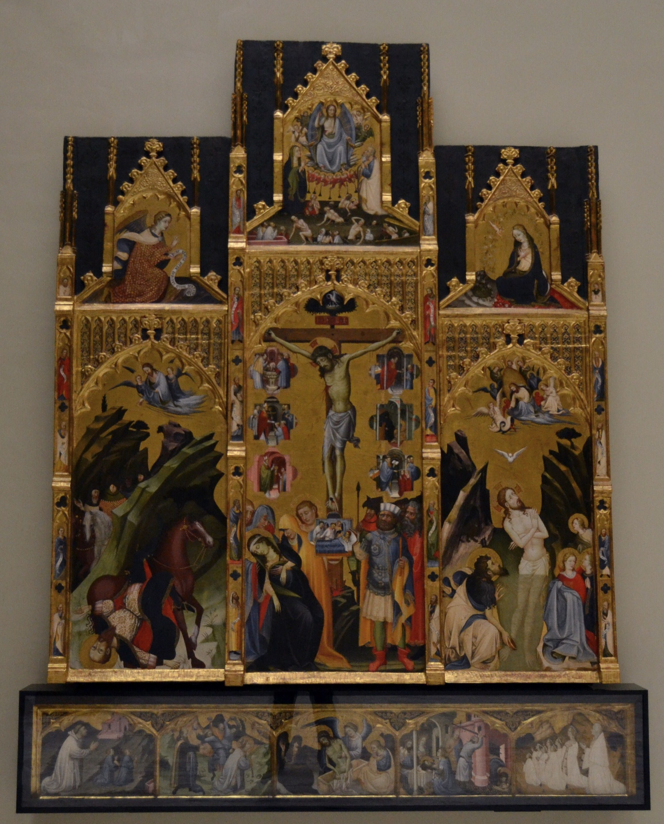 Esta obra, conocida como el Retablo de los Sacramentos o el Retablo de Fray Bonifacio Ferrer, fue realizada a finales del siglo XIV.